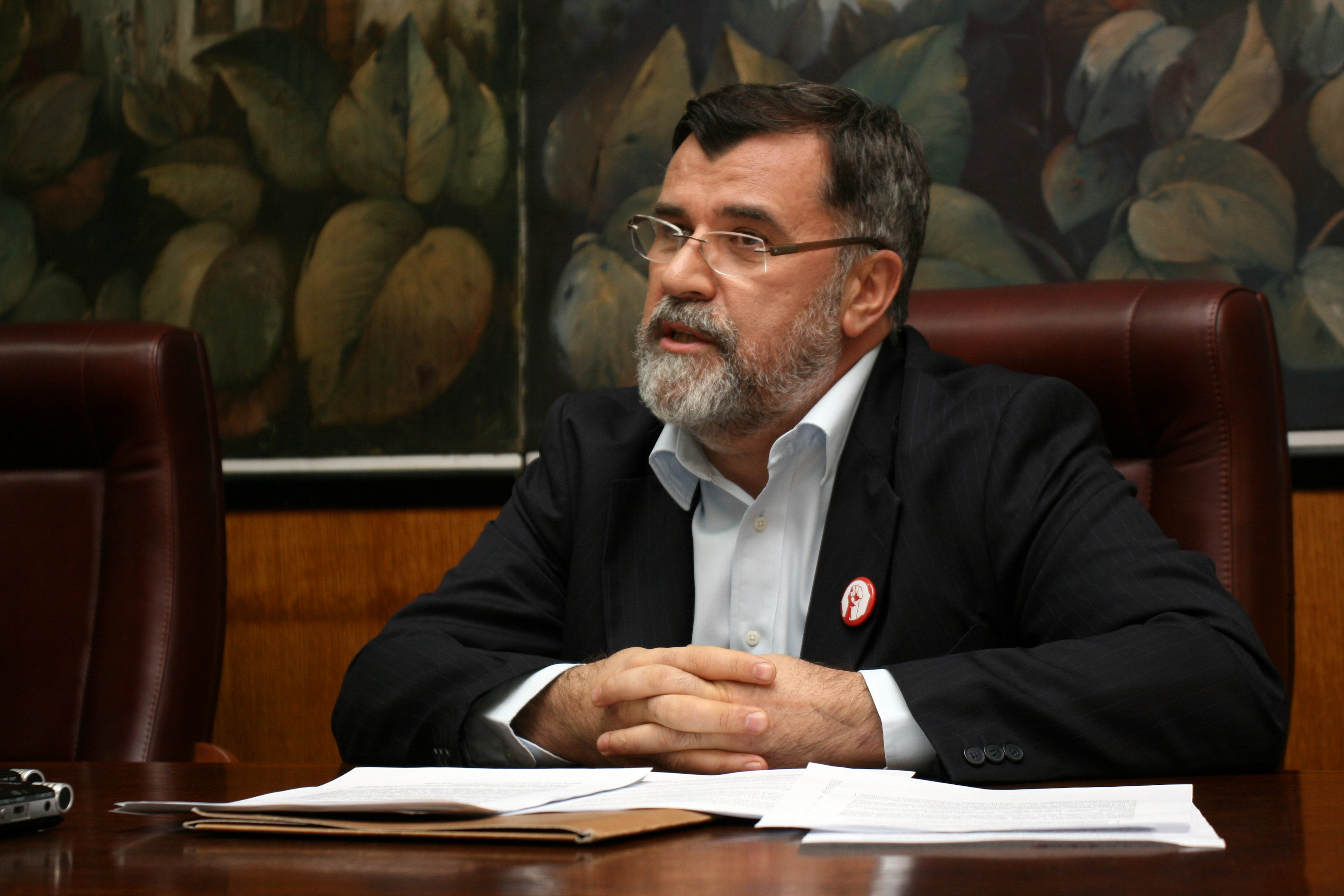 Veran Matić, novembar 2011. godine. Slika je preuzeta sa Multimedijalnog portala APV.